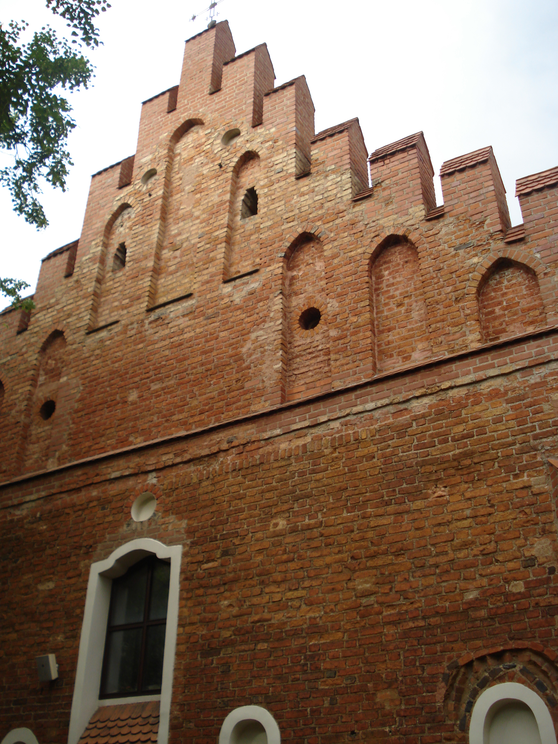 The Church of St. Nicholas in Vilnius (Šv. Mikalojaus bažnyčia). Šv. Mikalojaus g. 4